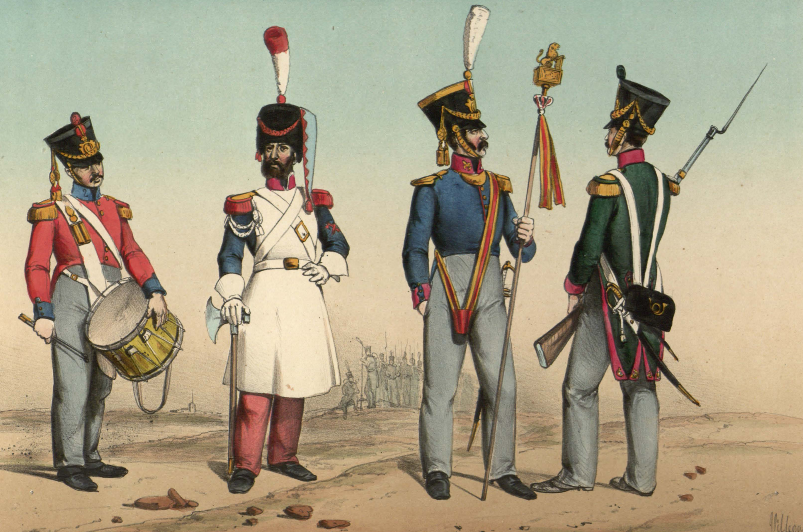 Tambor, gastador de infantería de linea, leonífero, y soldado de infantería ligera durante el Trienio Liberal.